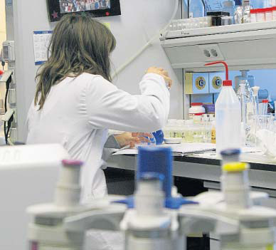 Laboratorio en el Instituto de Química Molecular Aplicada de la Universidad Politécnica de Valencia.